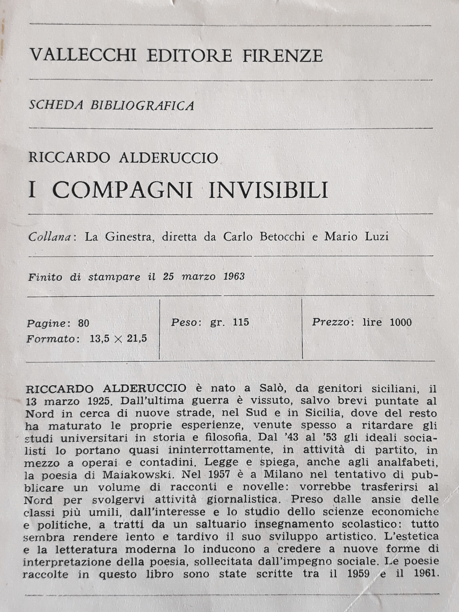 Scheda Bibliografica "I Compagni Invisibili" di Riccardo Alderuccio Collana : La Ginestra